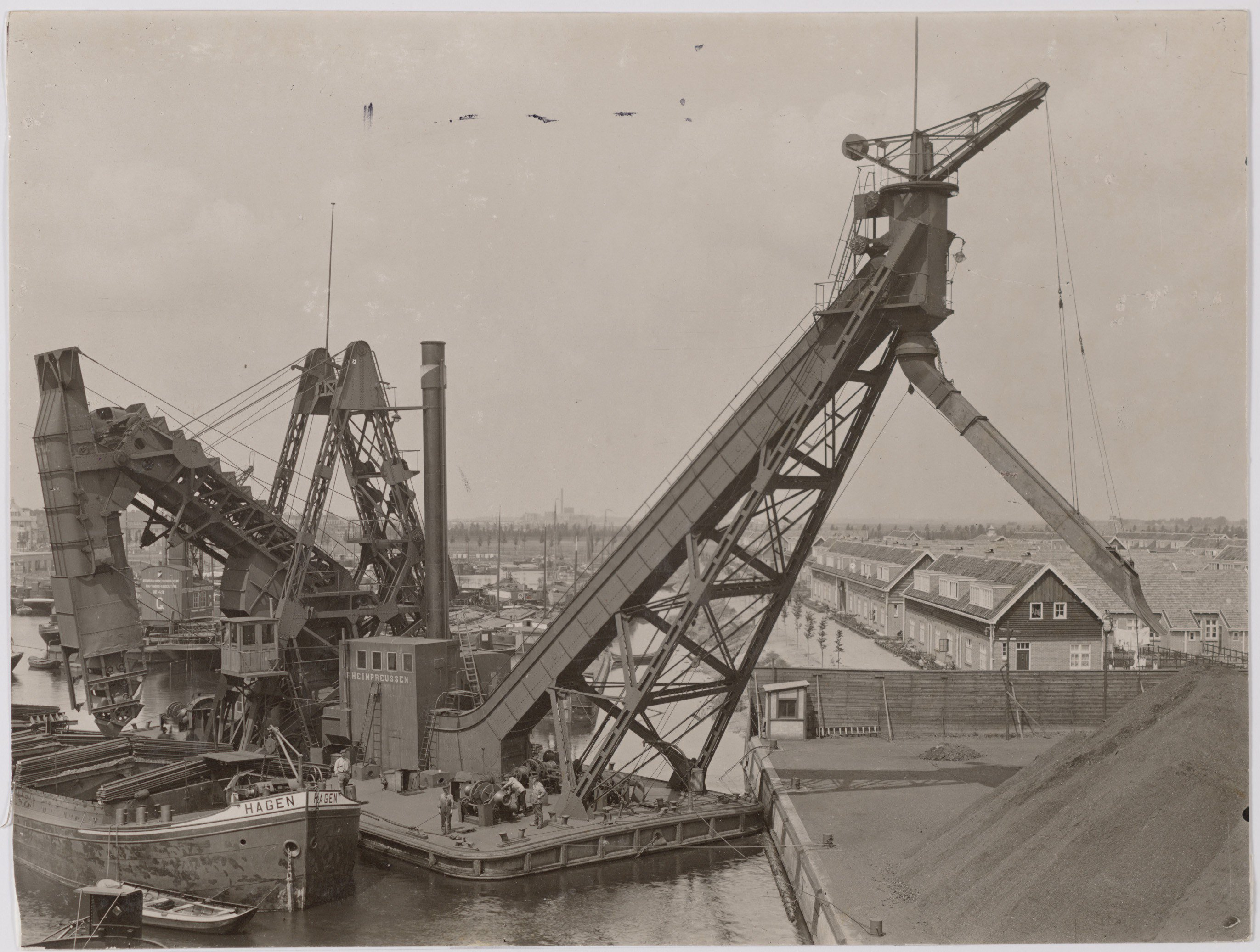 Johan van Hasseltkanaal (oost) Gezien in NW.-richting. rechts: Vogelkade. Op de voorgrond: Schip 'Hagen' wordt geladen en gelost.